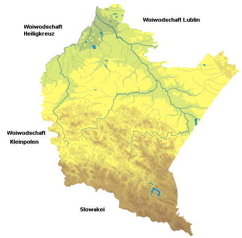 Podkarpackie mapa fizyczna san